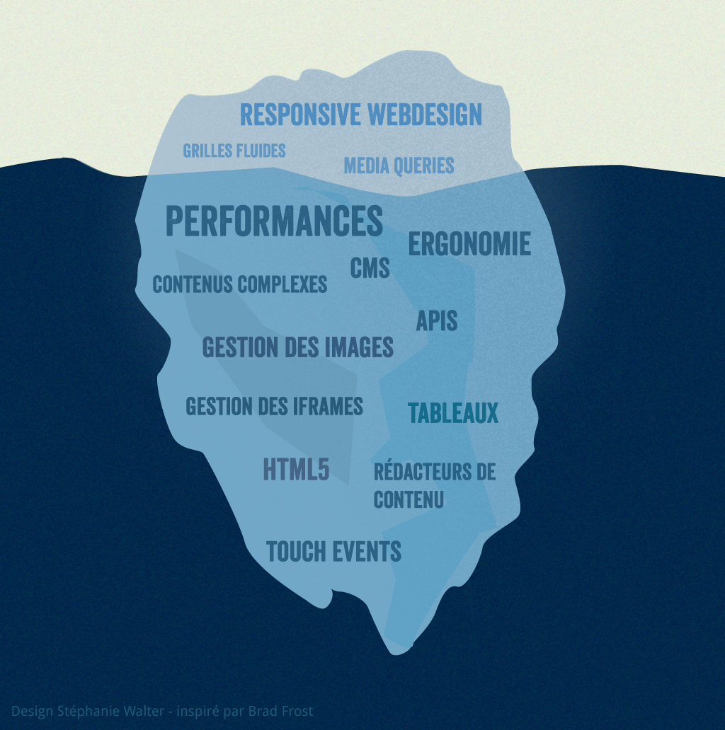 Image expliquant le concept d'adaptive design